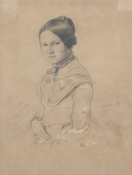 Ludwig Knaus: Porträt einer jungen Frau in Dreiviertelfigur, 1846, Bleistiftzeichnung auf Velin, 26,5 x 20,4 cm, Privatsammlung Wiesbaden.